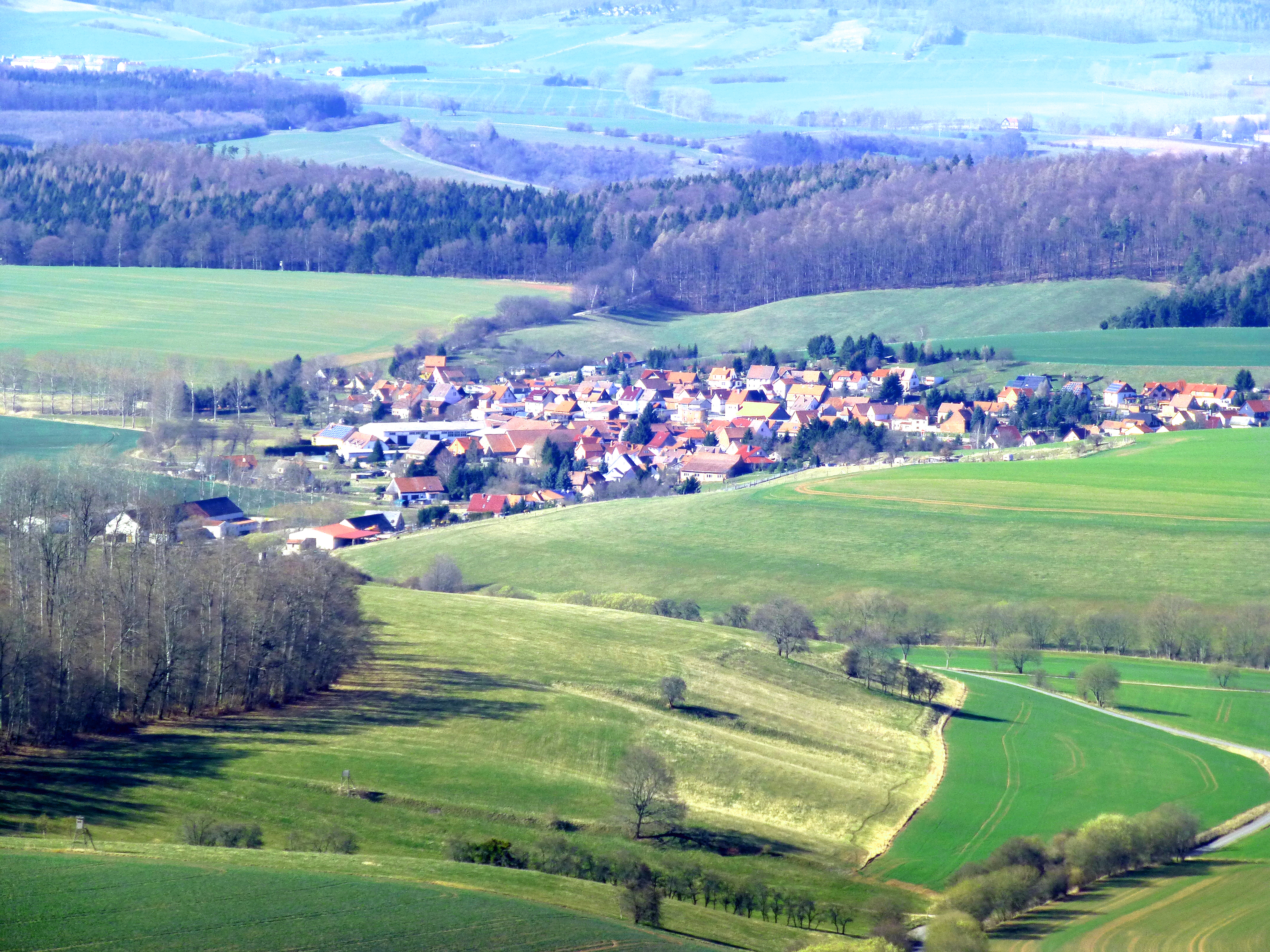 Blick auf Gerterode